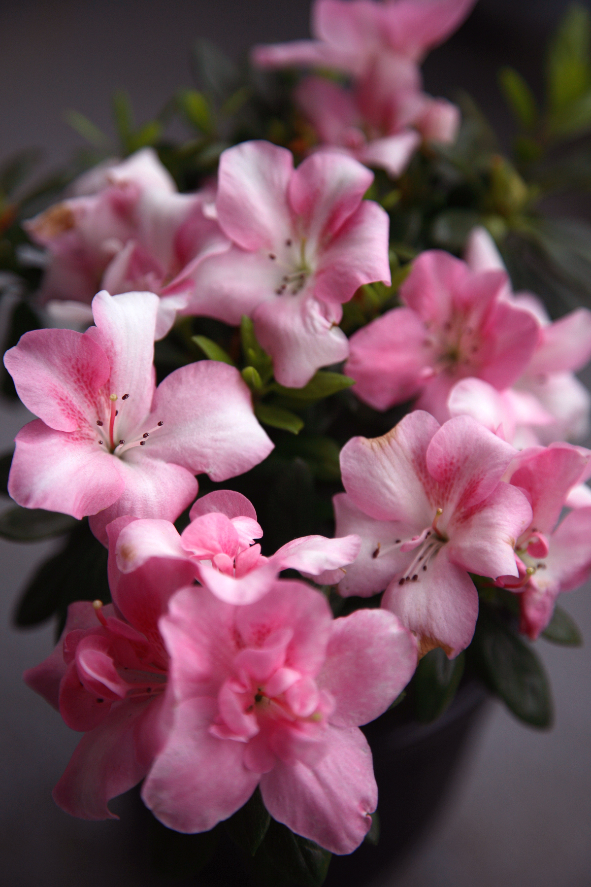 Rhoddendron simsii